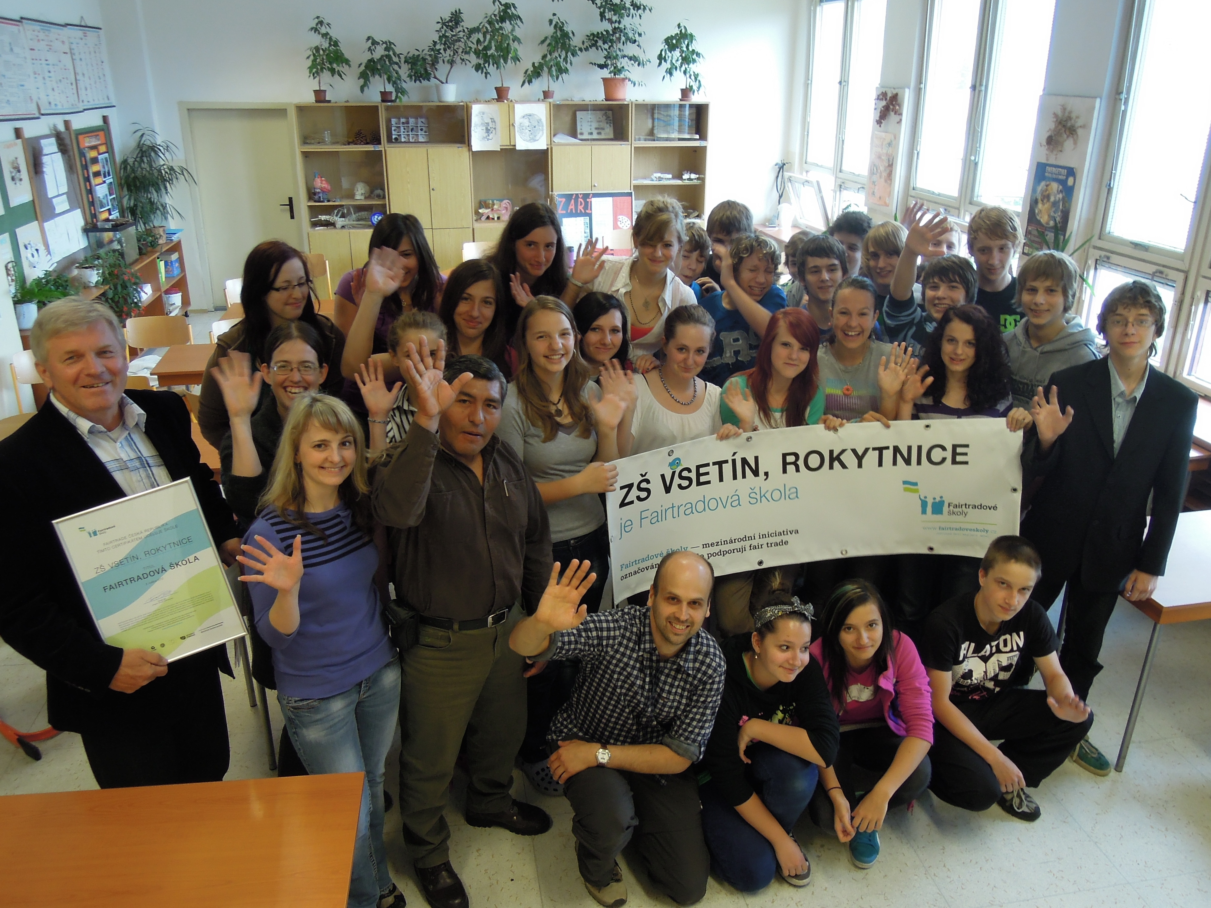 Předávání statusu Fairtradová škola ZŠ Rokytnice Vsetín